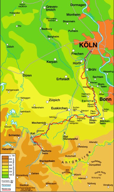 Der Verlauf des Römerkanal-Wanderweges von Nettersheim nach Köln